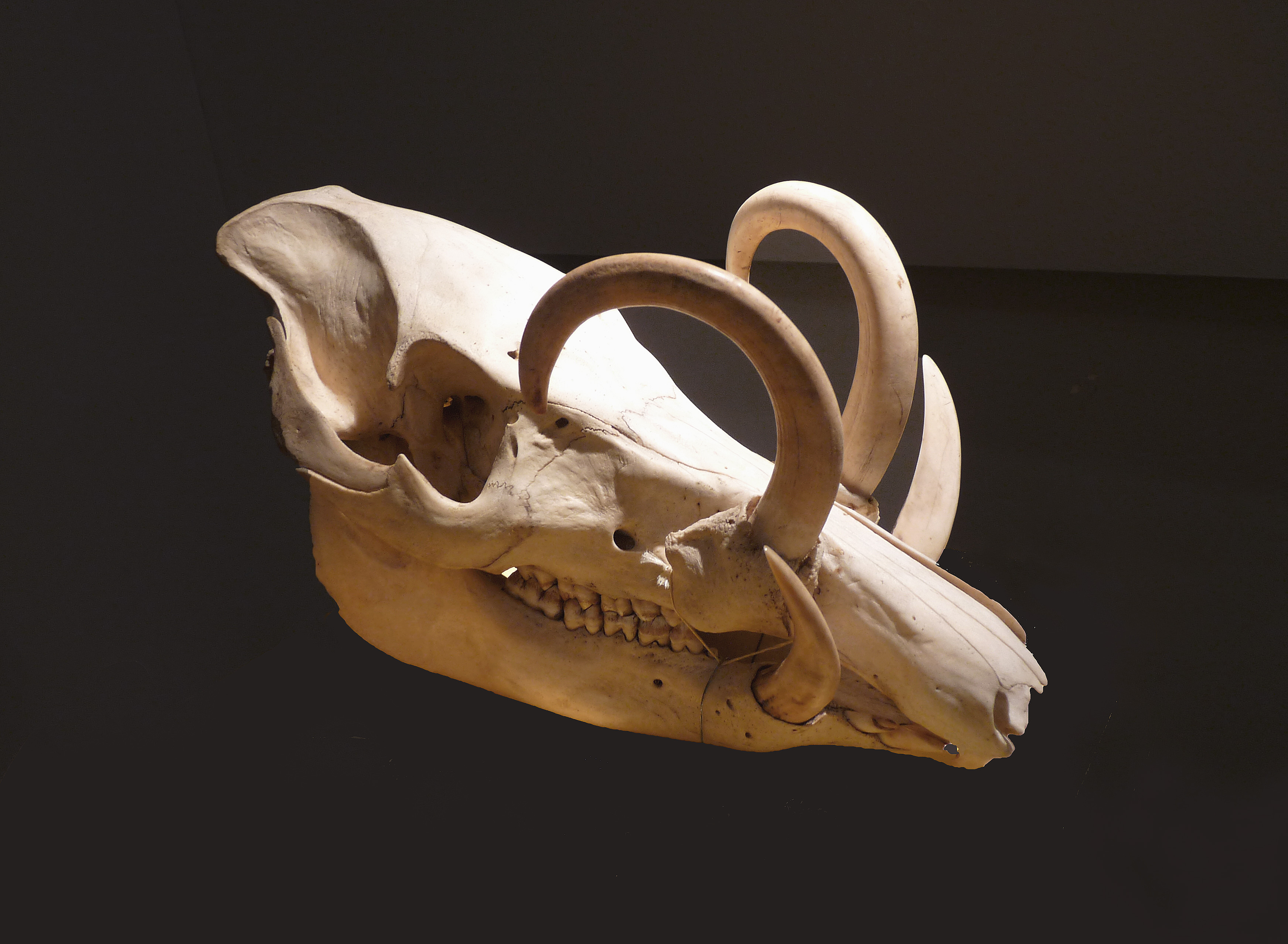 Crâne de babiroussa (Babyrousa celebensis) au Musée zoologique de Strasbourg